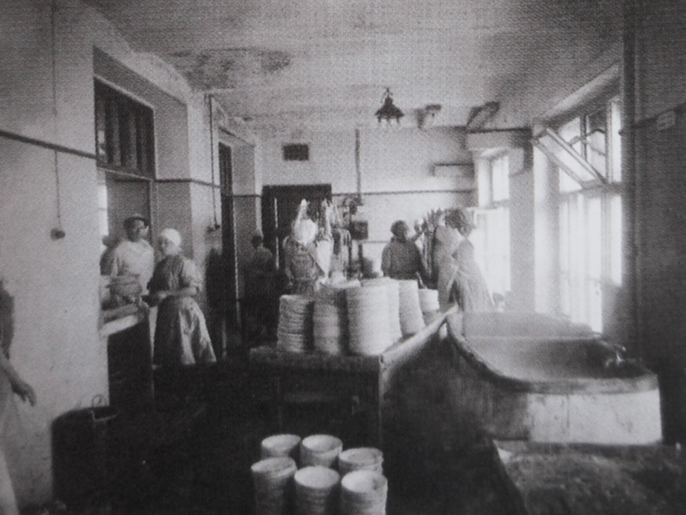 Кухня фабрики-кухни. Фото конца 1920-х